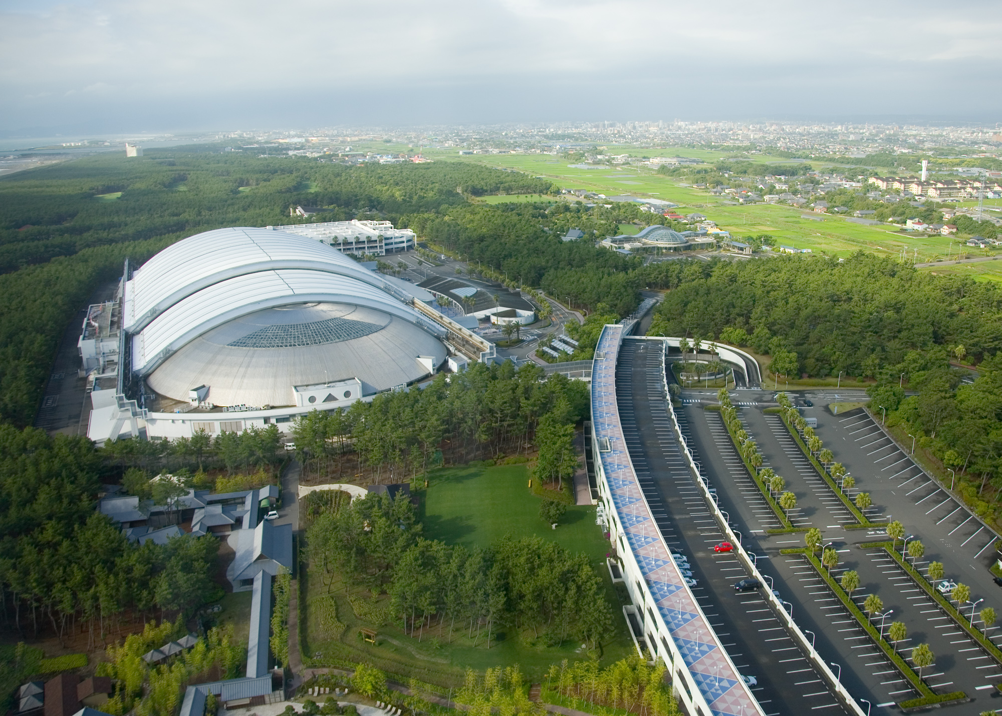 Overlooking Miyazaki Ocean Dome (SeaGaia)